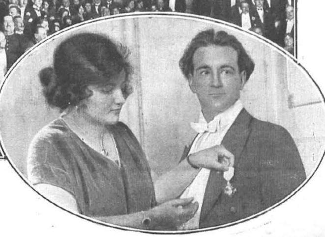 La esposa del eminente tenor Hipólito Lázaro colocando a éste, en el Teatro Real de Madrid, la insignia de la Gran Cruz de Alfonso XII con que le ha honrado S.M. Alfonso XIII.